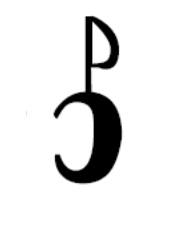 дига эляпилля